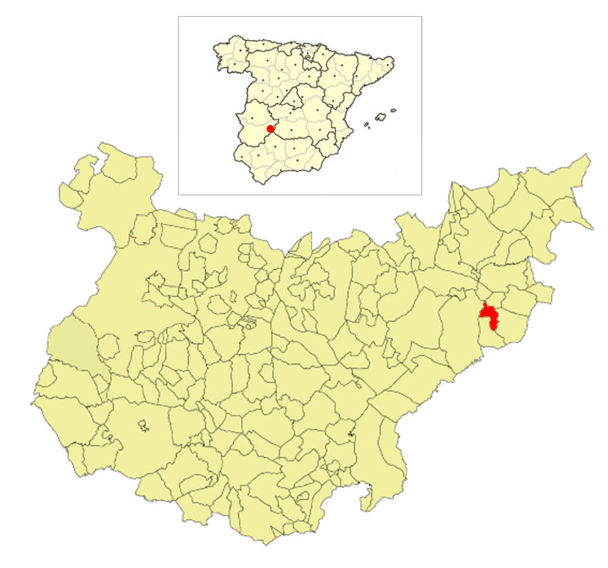 Situación del municipio de Peñalsordo respeto a España y su provincia